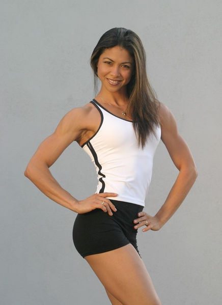 Lyen Wong